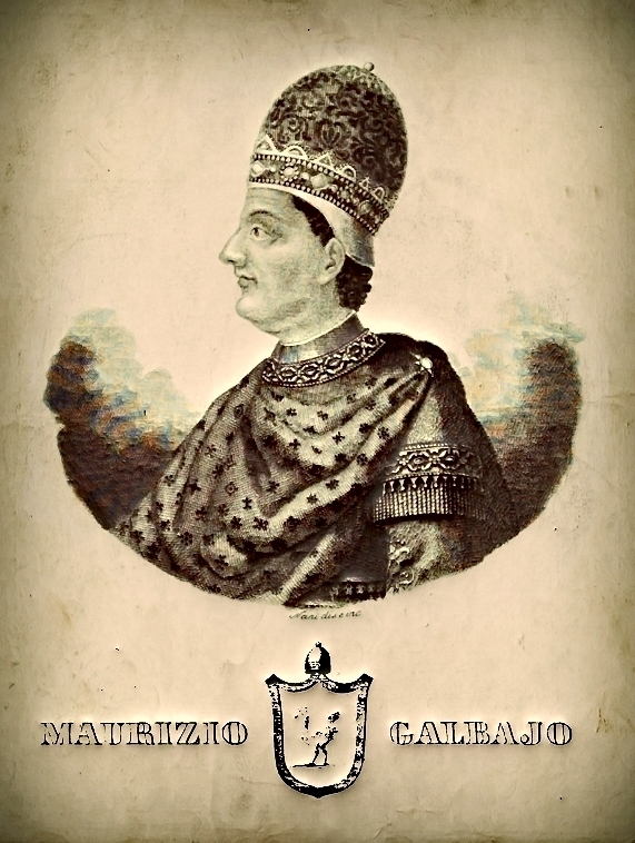 Портрет Мауріціо Гальбайо, 7-го дожа Венеції